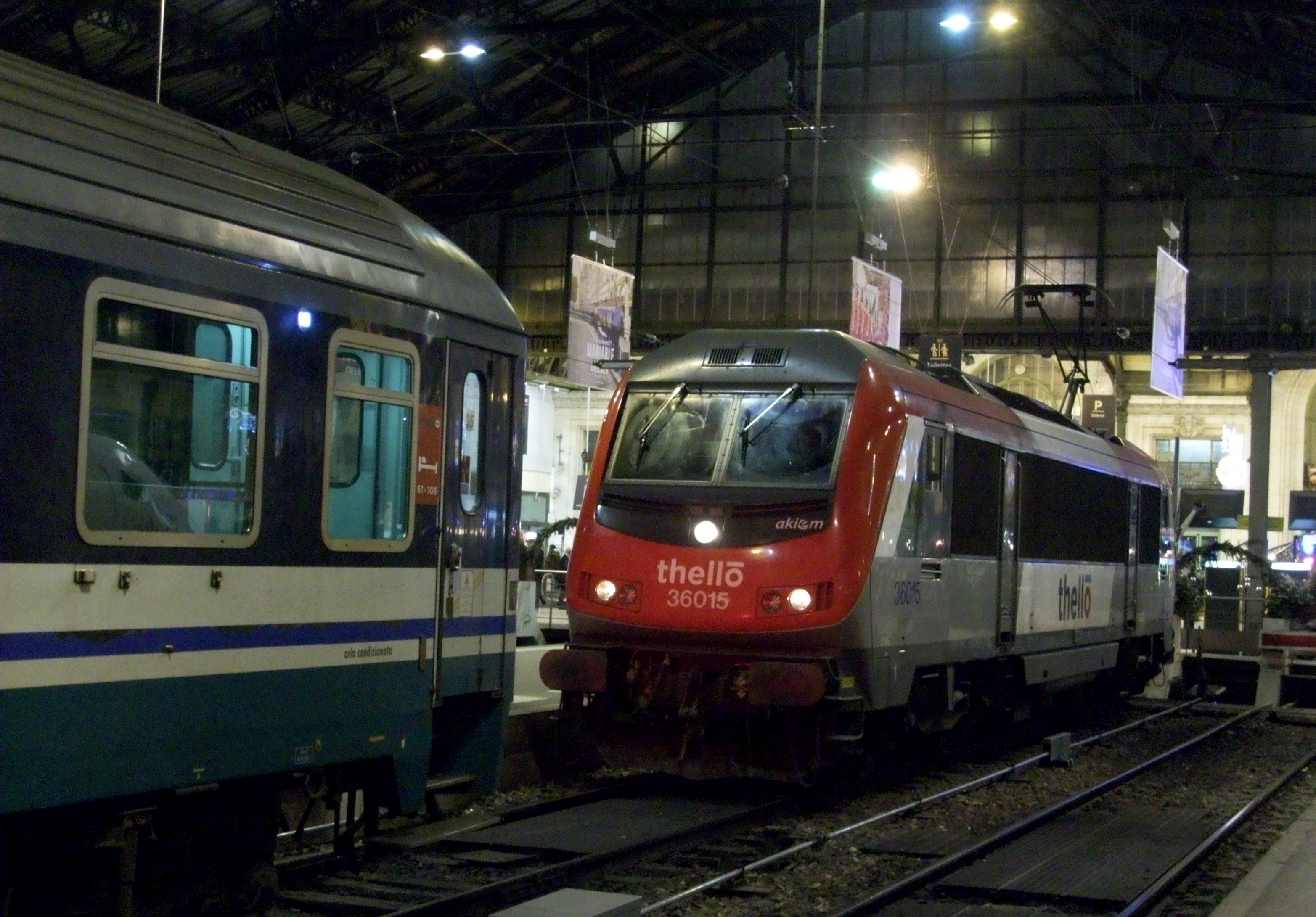 BB 36015 et voitures couchettes de l'opérateur Thello à Paris